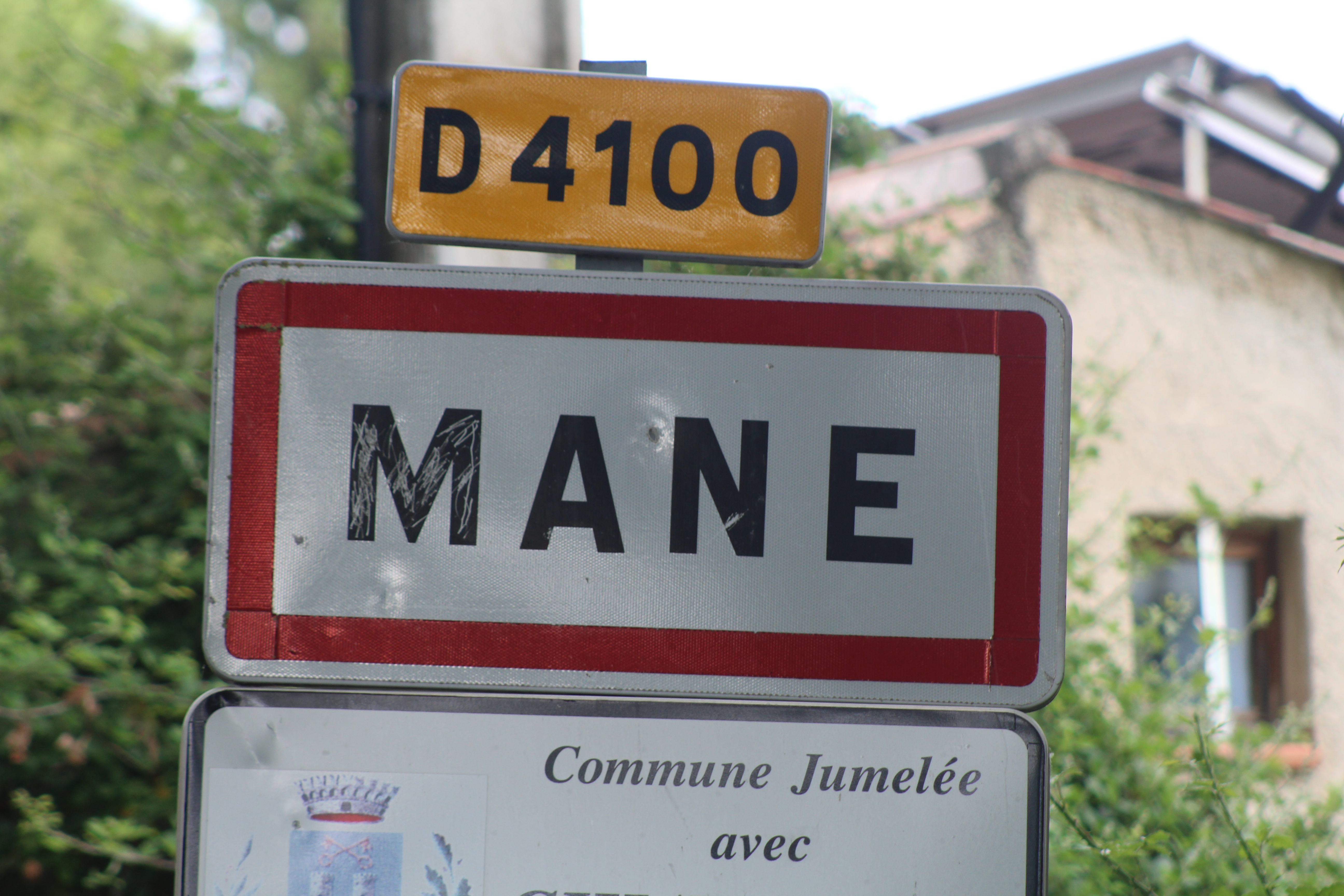 Panneau d'entrée dans Mane, Alpes-de-Haute-Provence.